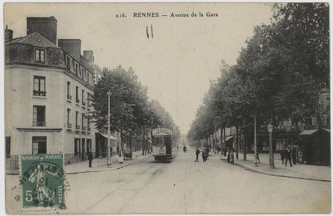 Carte postale de l'avenue de la Gare (aujourd'hui avenue Jean-Janvier) de Rennes, avec une rame de tramway au second plan et le bâtiment de la gare en arrière plan. Conservé aux Archives de Rennes, 100 Fi 12. Tampon de la poste de 1913.